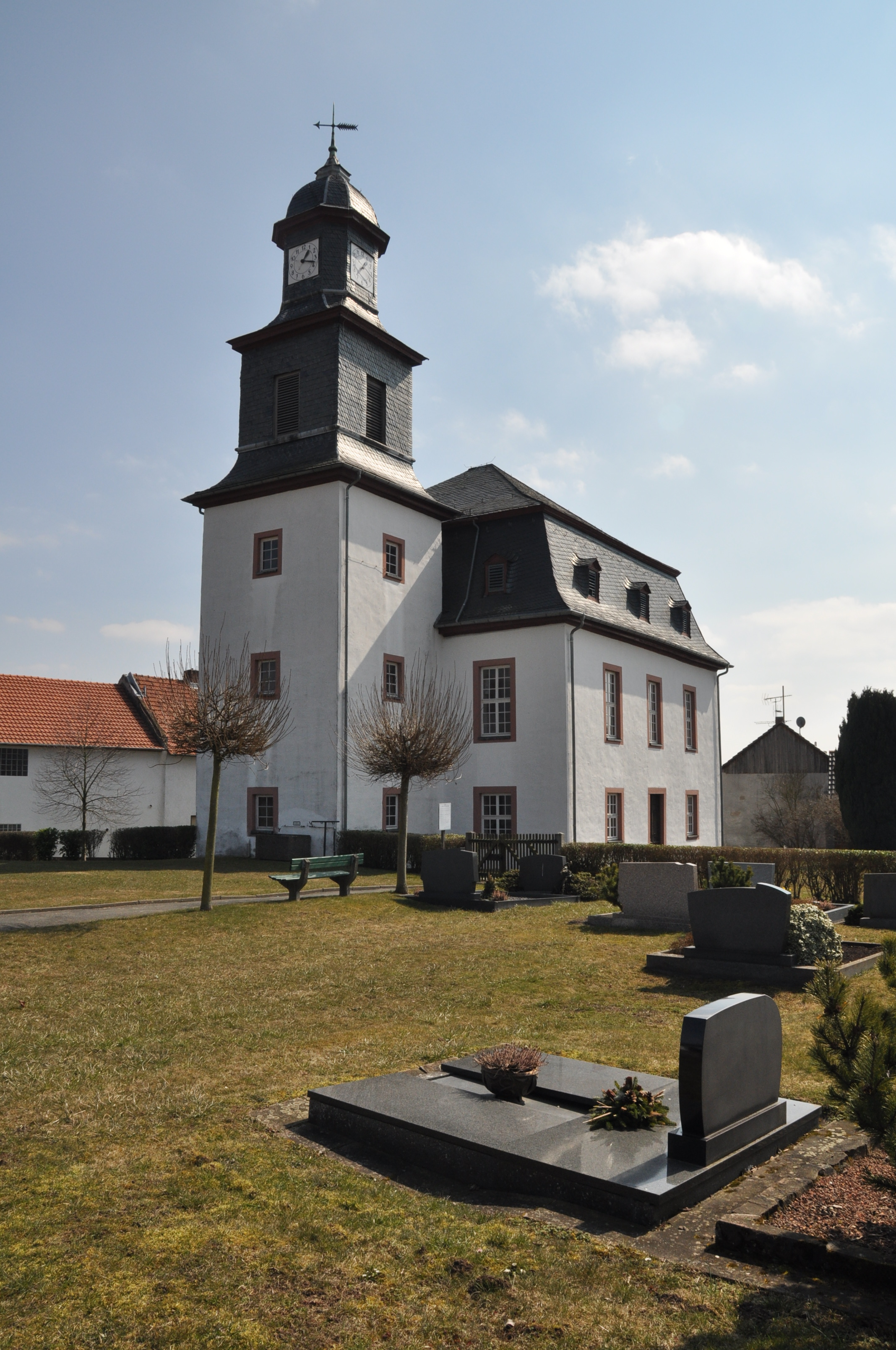 Lich-Birklar, ev. Kirche